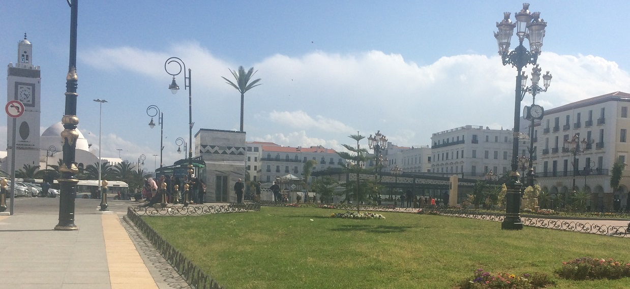 Vue de l'accès principal de la station Place des Martyrs du métro d'Alger